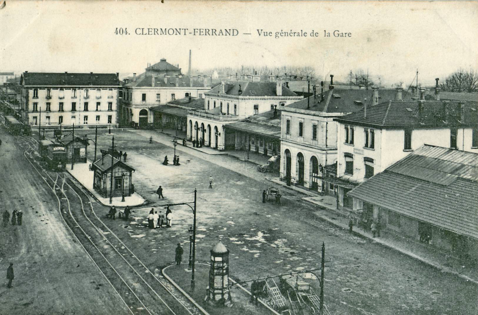 Carte postale ancienne éditée par G d'O, n°404 : CLERMONT-FERRAND - Vue générale de la Gare